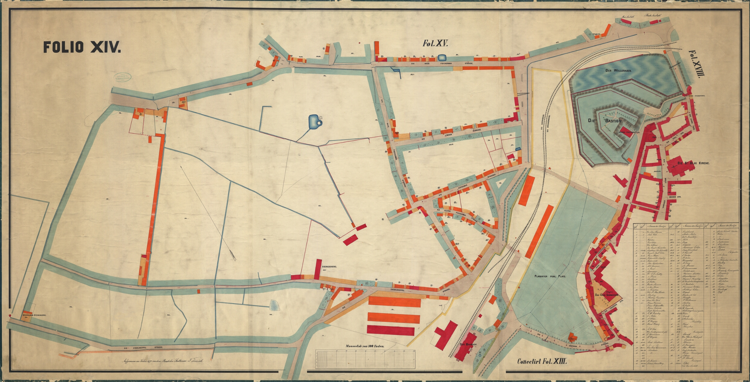 Leht 1 Fol XIV Ziegelskoppel, Kleine, Alte u. Neue Fischermai, Kotzebue u. Linden Strasse. Publ. Platz vor der Süstern Pforte. Glacis